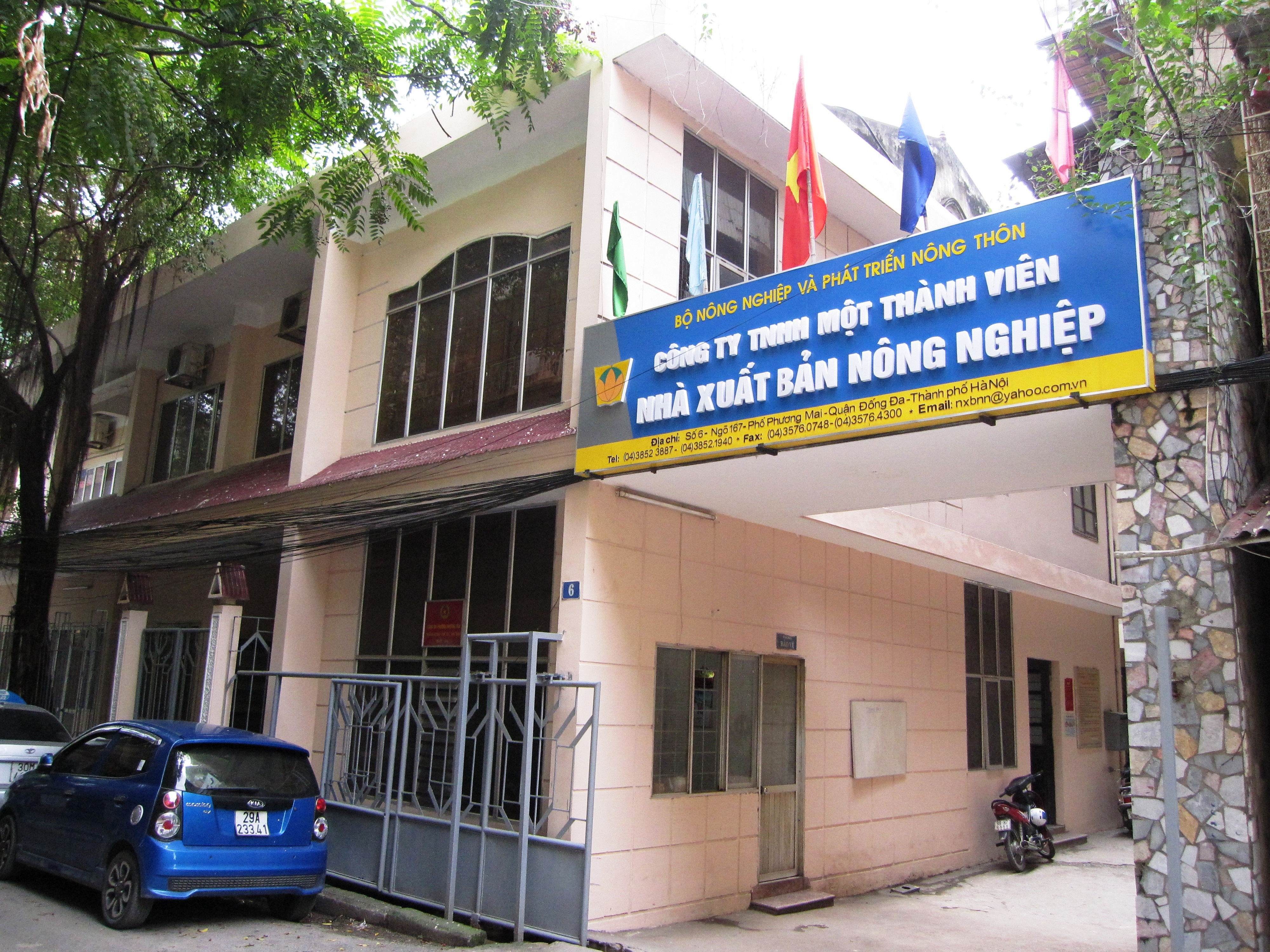 Số 6/167 Phương Mai - Đống Đa - Hà Nội